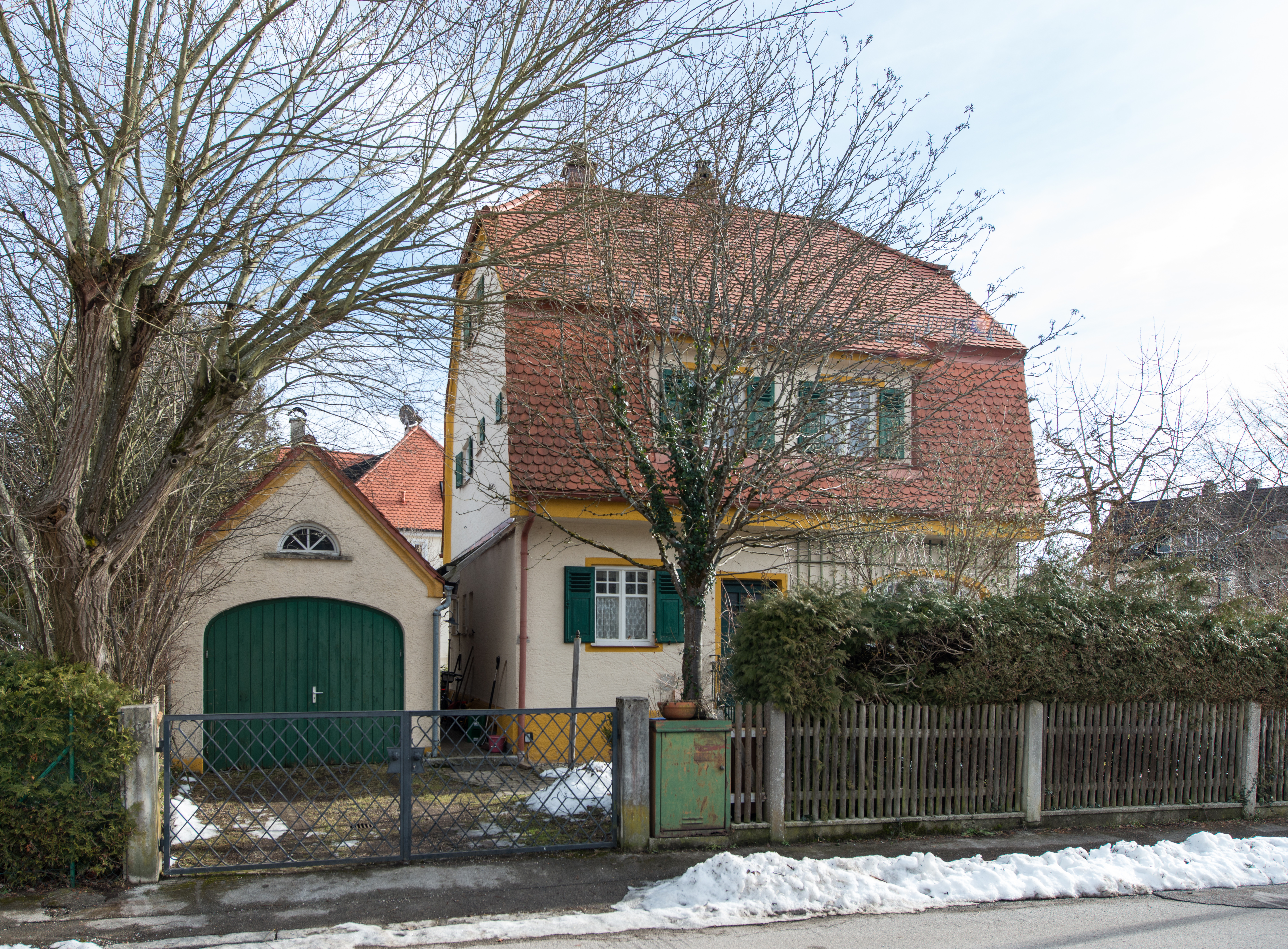 Denkmalgeschütztes Gebäude in Stockdorf